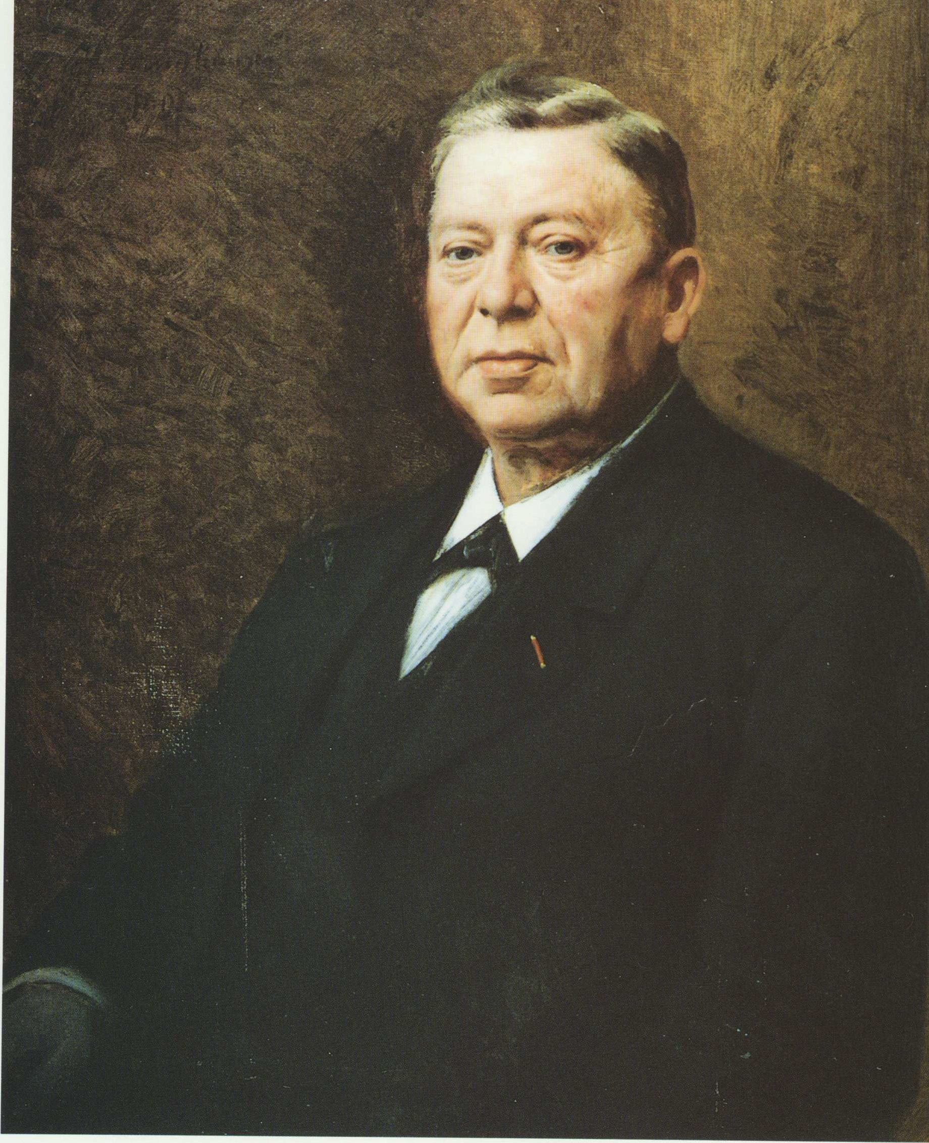 Pendant of Portrait of Johanna van Woerkom